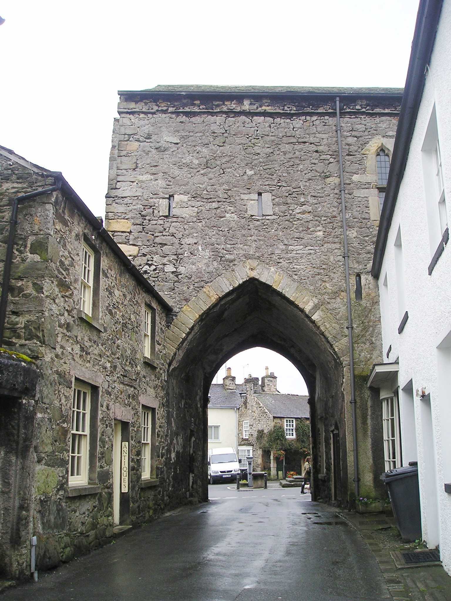 Cartmel, Cumbria, Tor der ehemaligen Priorei